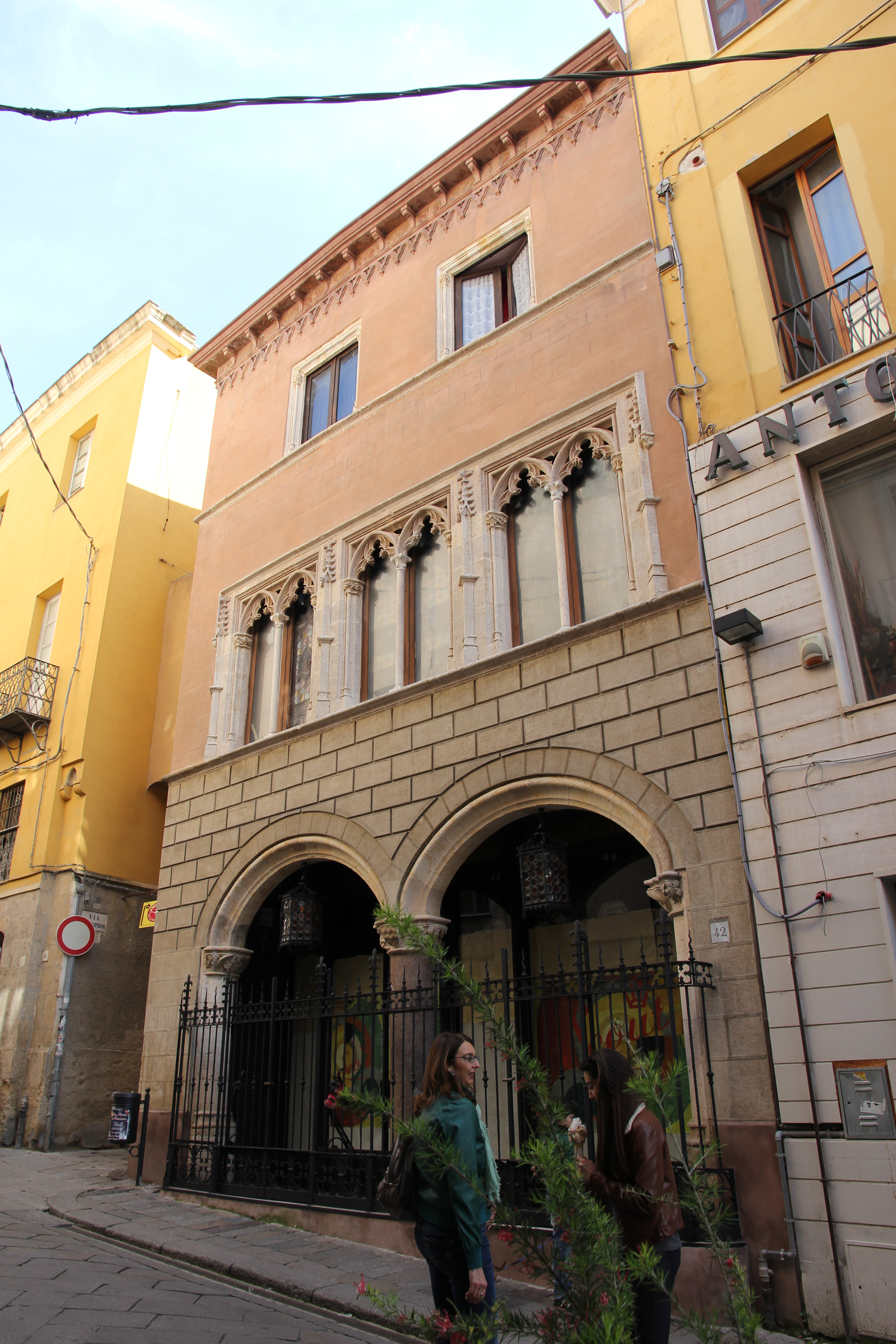 Sassari - Casa di re Enzo o casa Guarino